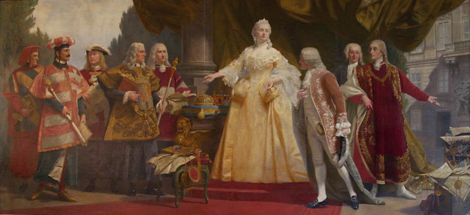 Wien, Haus-, Hof- und Staatsarchiv am Minoritenplatz (Maria Theresia von Österreich; links die Herolde von Österreich, dem römisch-deutschen Reich, Böhmen, Ungarn und Burgund; rechts der erste Hausarchivar Taulow von Rosenthal, der erste Archivdirektor Johann Christoph Freiherr von Bartenstein und Staatskanzler Wenzel Anton Fürst Kaunitz (im Ornat des Ordens vom Goldenen Vlies), Kaunitz zeigt auf den Reichskanzleitrakt der Wiener Hofburg; siehe Artikel von Thomas Just, S. 200f.)